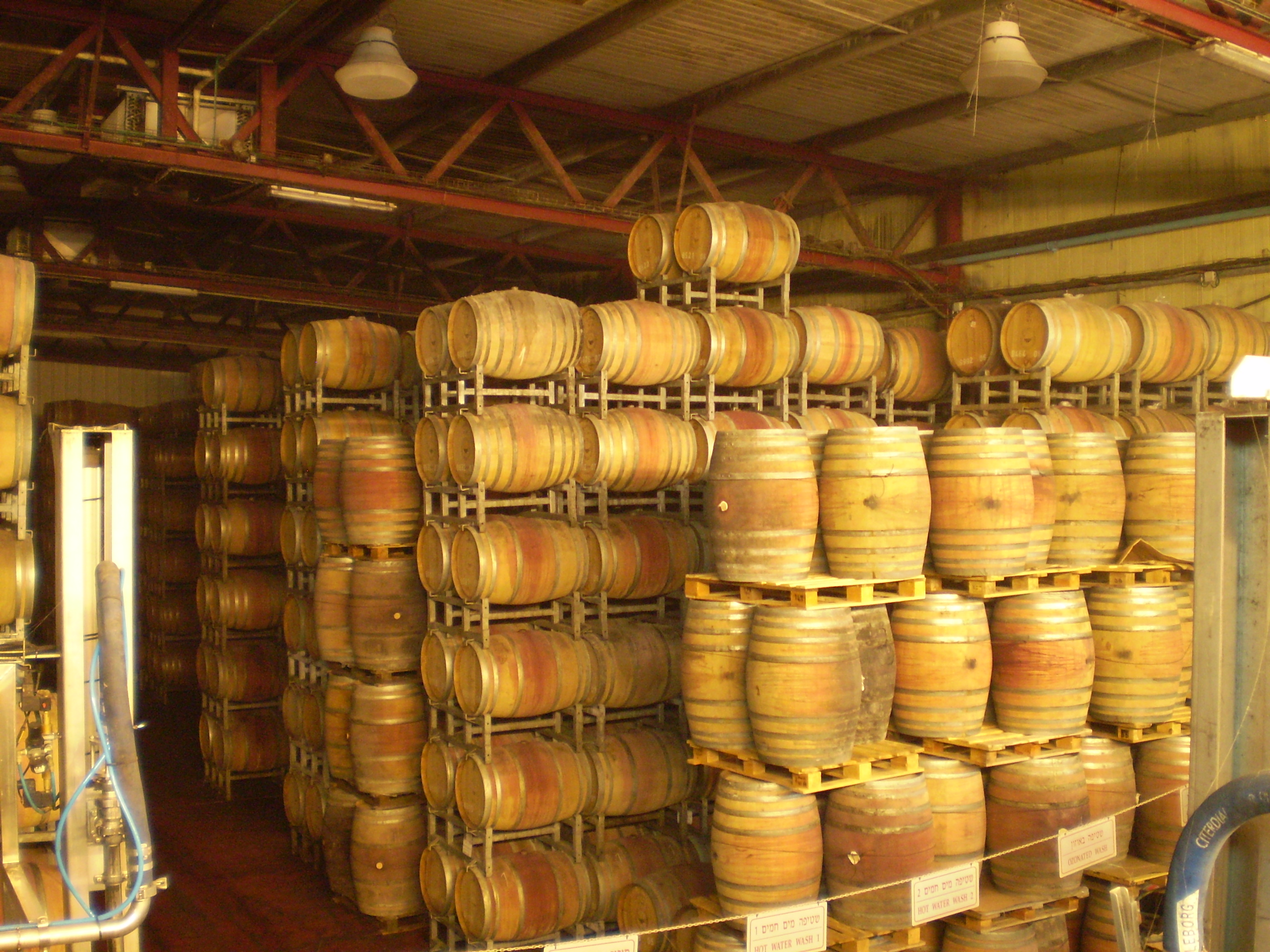 יקבי רמת הגולן